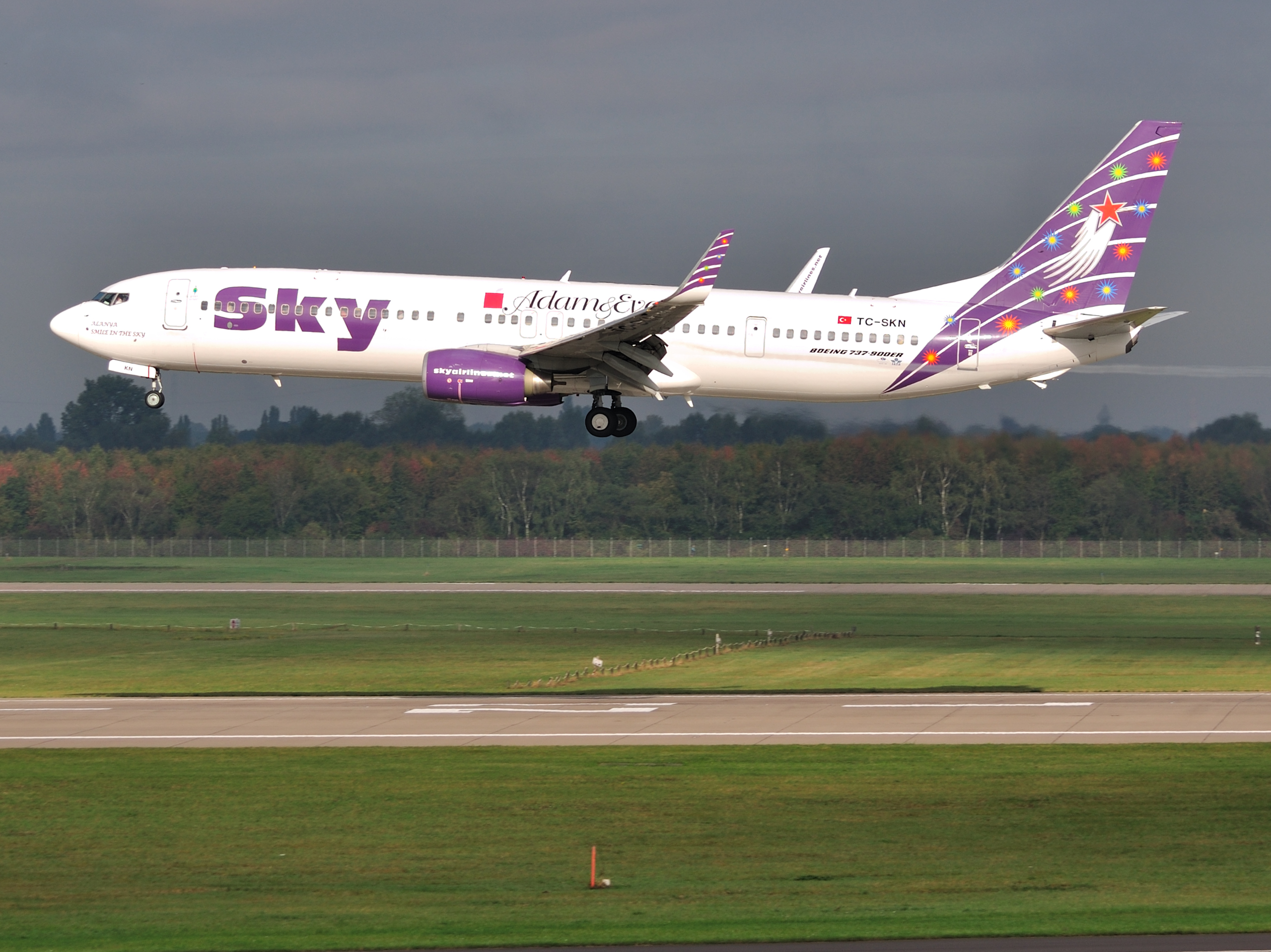 Sky B737-900 TC-SKN